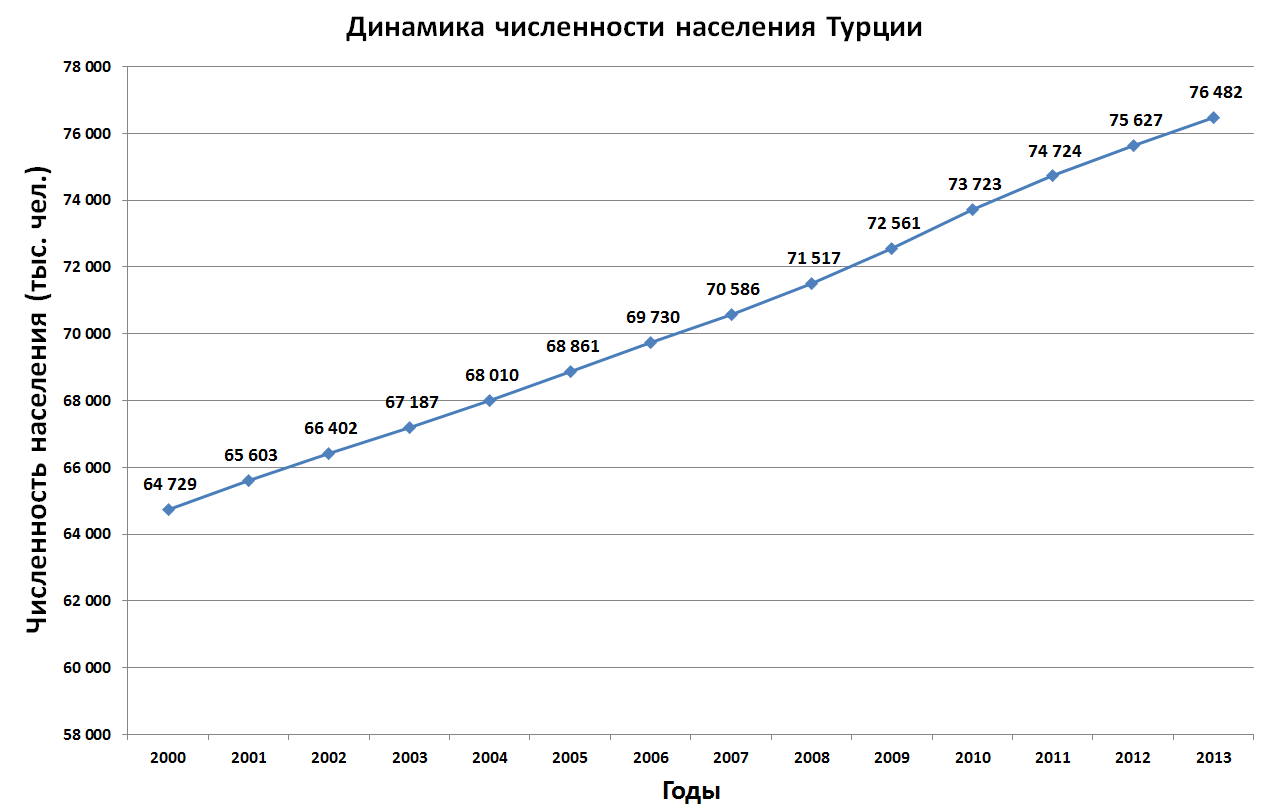 Население Турции 2000-2013 гг.